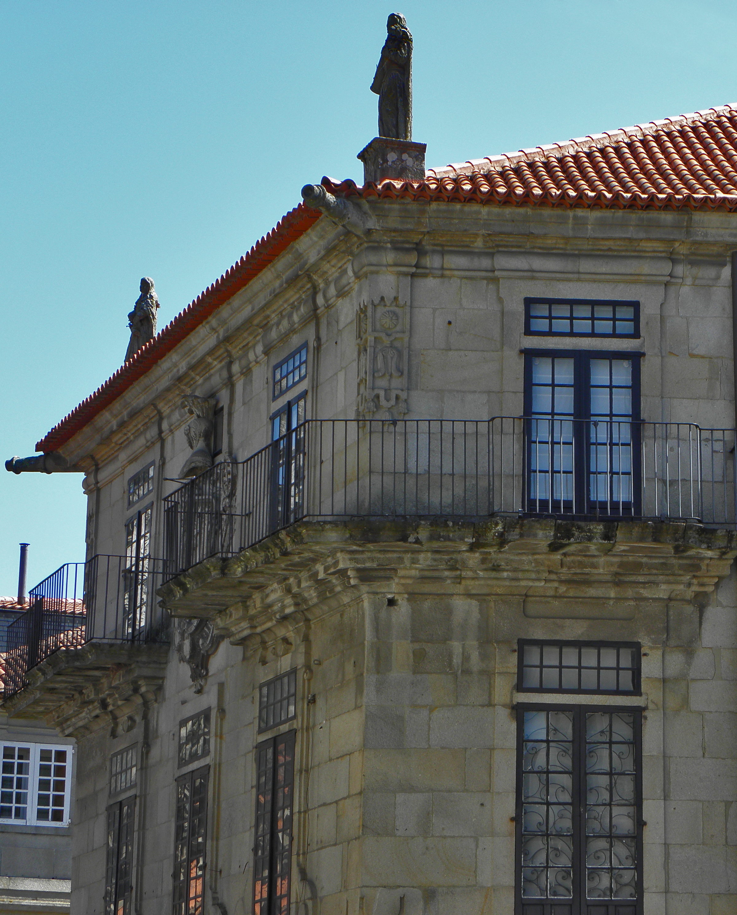 Sobre el nacimiento de la ciudad de Pontevedra existe una leyenda de origen renacentista que dice que el responsable de la fundación de la villa fue Teucro, uno de los héroes de la Guerra de Troya. La leyenda dice que llegó a estas tierras tras ser rechazado por su padre Telamón y fundó un asentamiento con el nombre de Helenes y después de eso se casó con Helena la hija del rey Putrech quien en ese momento dirigía el ejército griego hacia la ciudad de Atenas. (wikipedia)